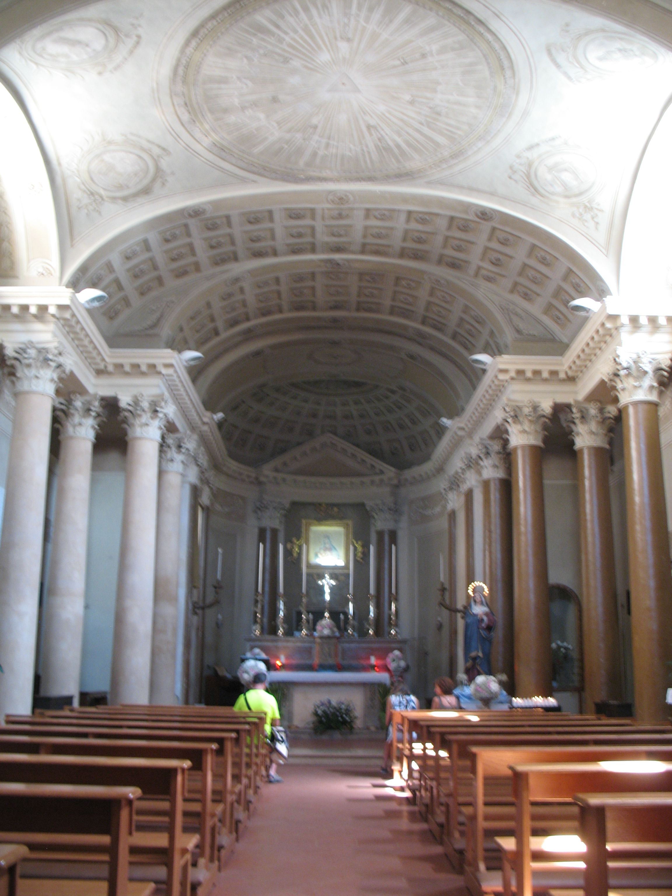 Spazio interno della Chiesa di Santa Maria di Montemorello (situata nelle immediate vicinanze di Palazzo Leopardi)